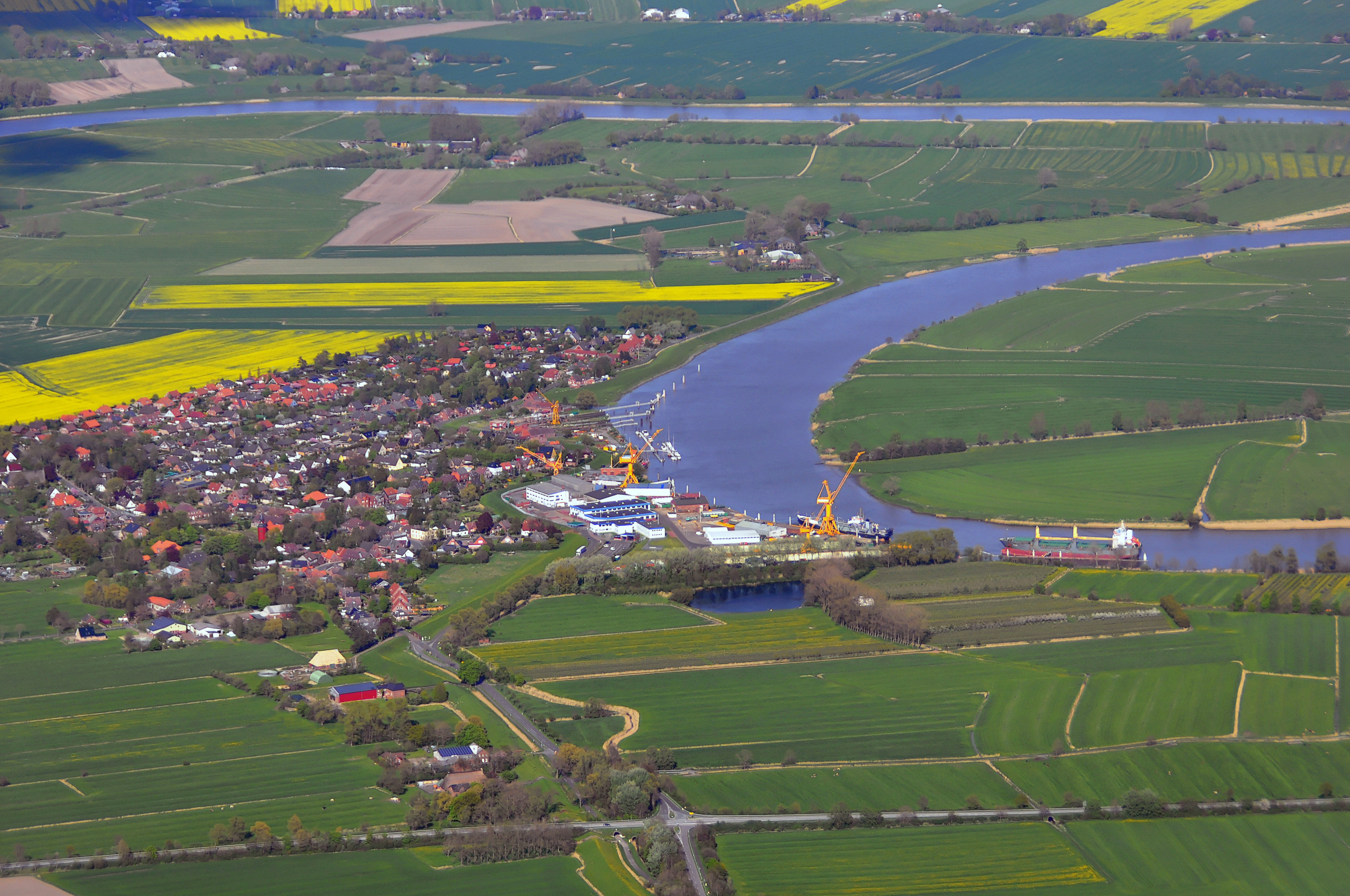 Luftbilder von der Nordseeküste 2012-05